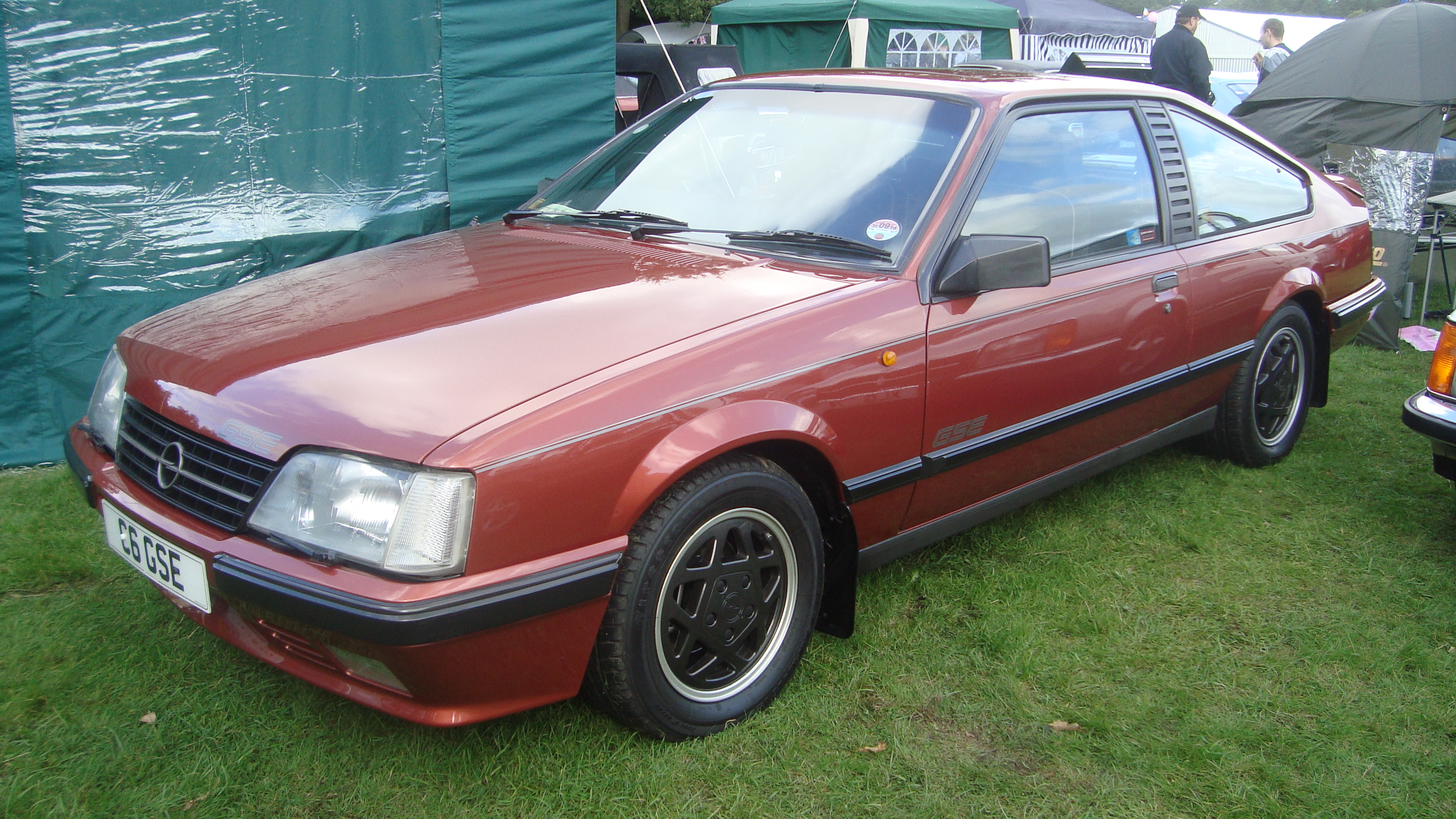 1985 Opel Monza 3.0 GSE